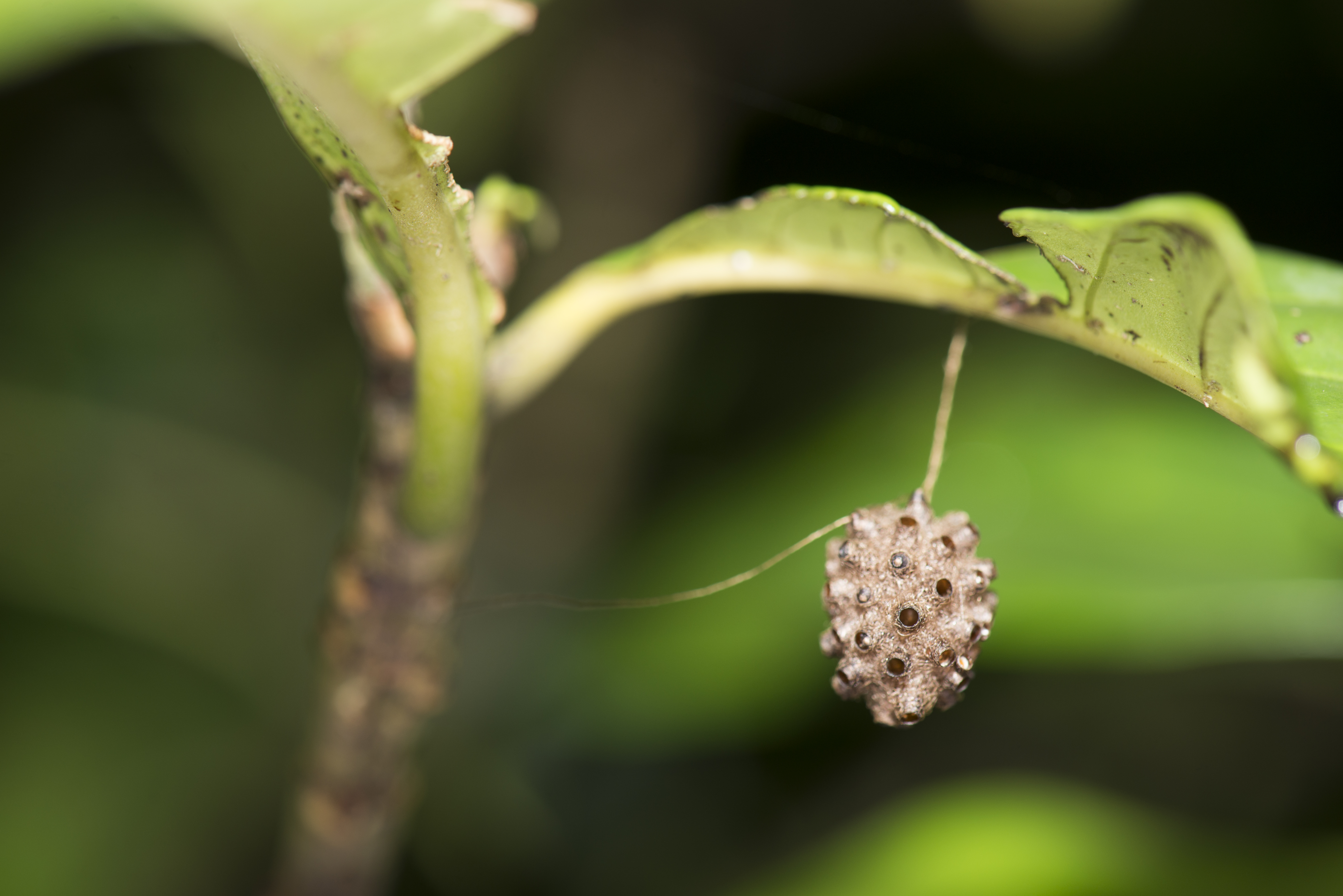 _ESG6880 Meteorus